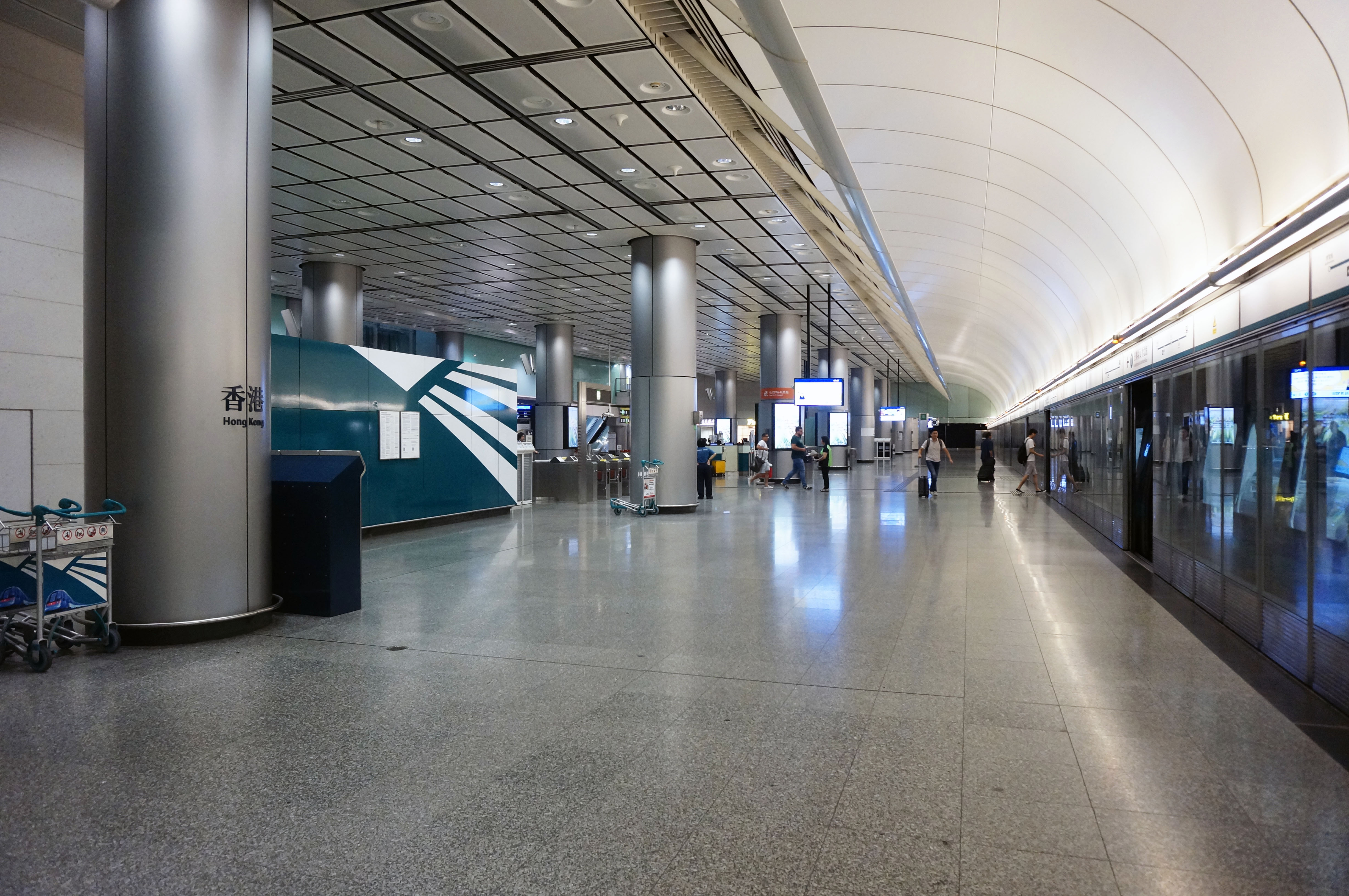 港鐵香港站月台